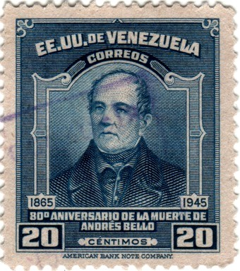 80 aniversario de la Muerte de Andres Bello estampilla venezolana de 20 centimos emitida en 1946